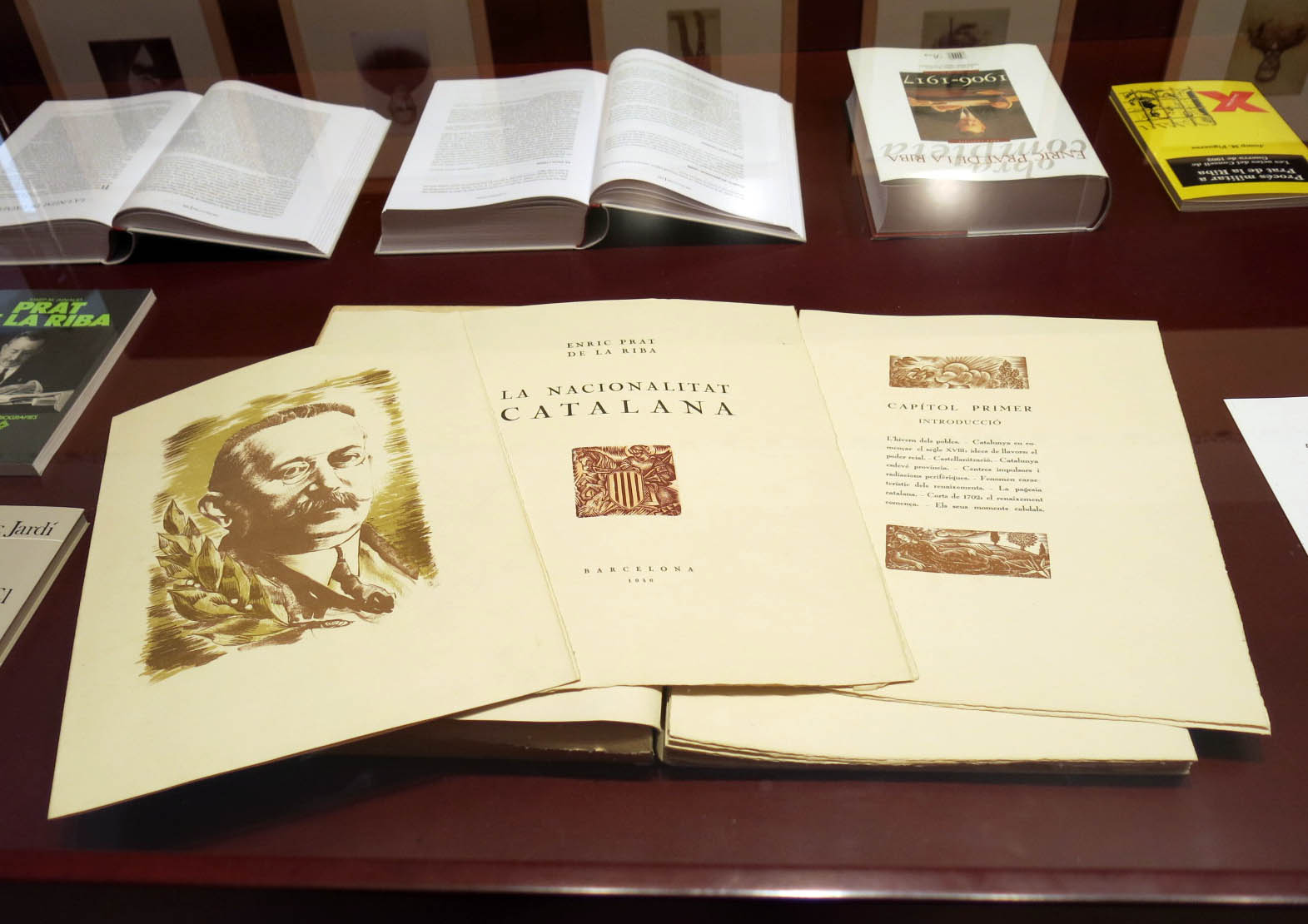 Casa Prat de la Riba (Castellterçol) Object location41° 45′ 05.38″ N, 2° 07′ 10.01″ E